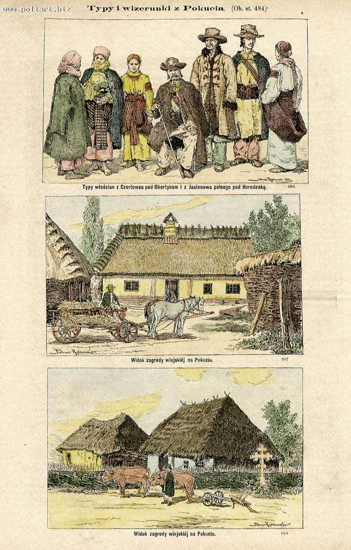 Чортовець під Обертином та Ясіновець Польний під Городенкою: Покуття